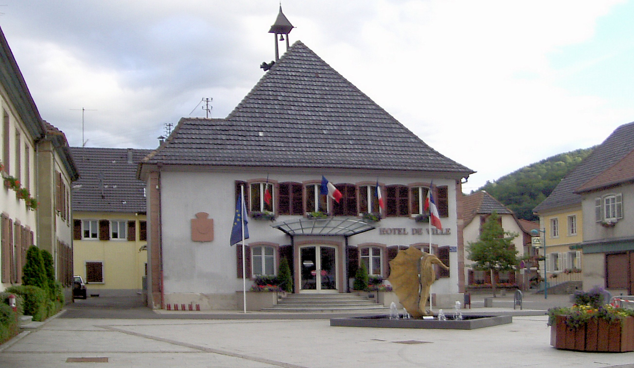 Hôtel de ville de Saint-Amarin